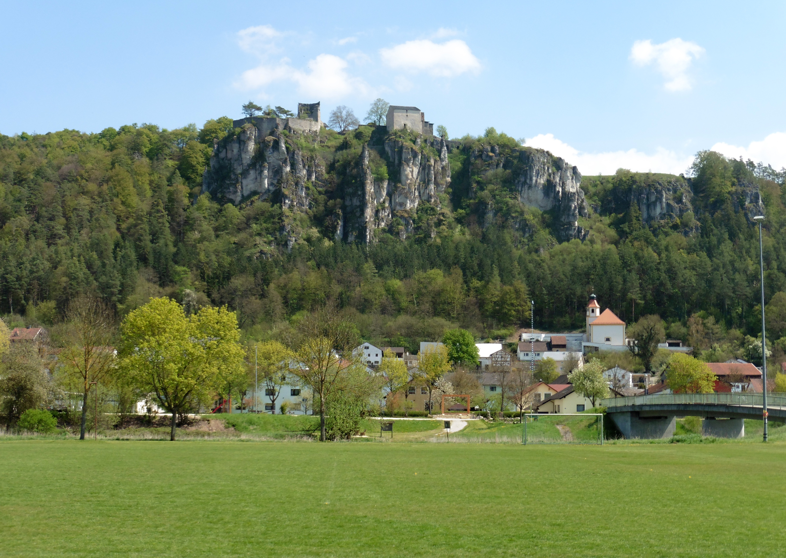 Arnsberger Leite im Mai mit der Burg Arnsberg oberhalb des Dorfes Arnsberg im Altmühltal. Naturschutzgebiet (NSG 00271.01) in Arnsberg im Altmühltal, Landkreis Eichstätt, Bayern. Ansicht von Westen.